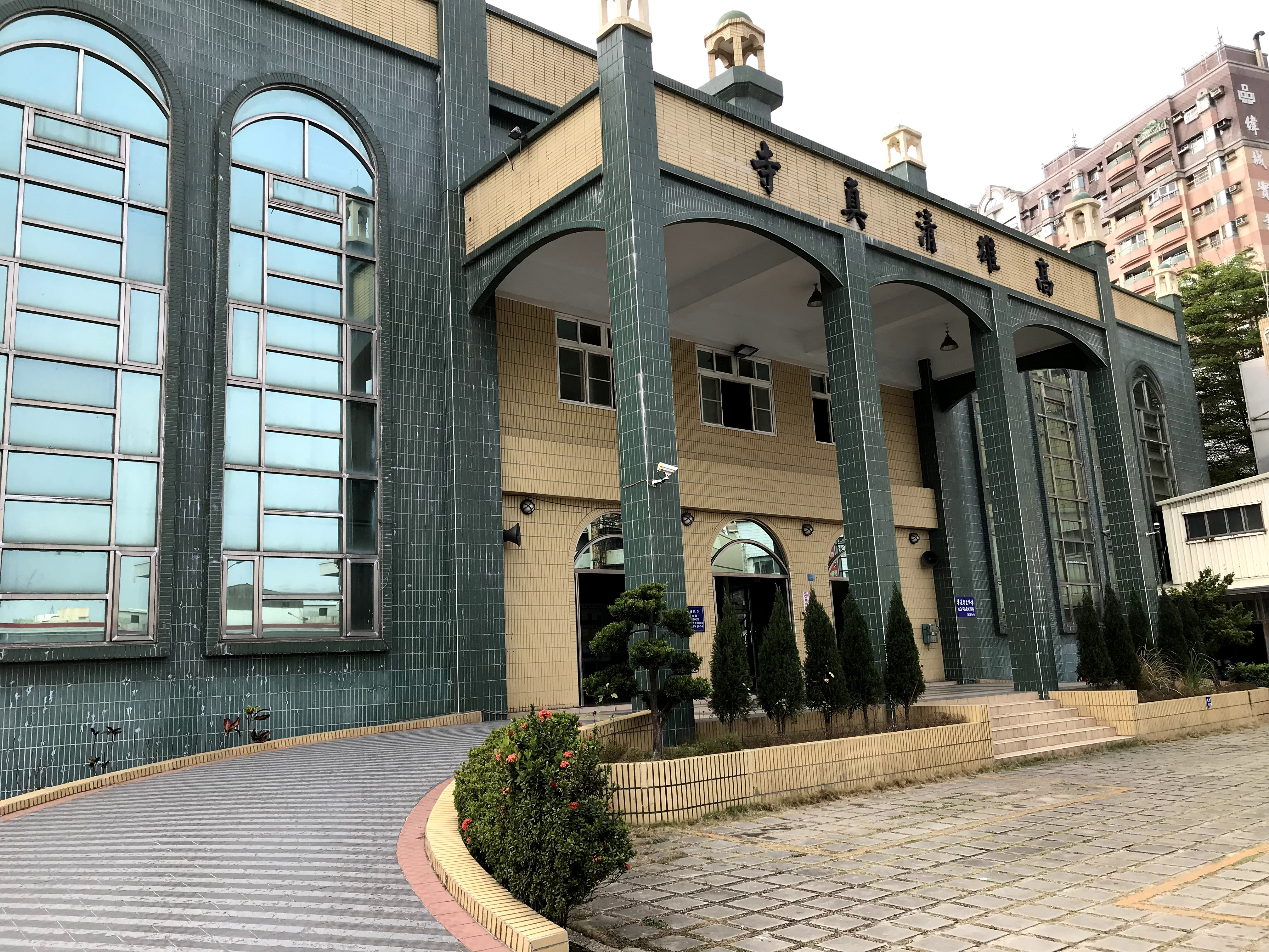 高雄清真寺迎賓車廊。